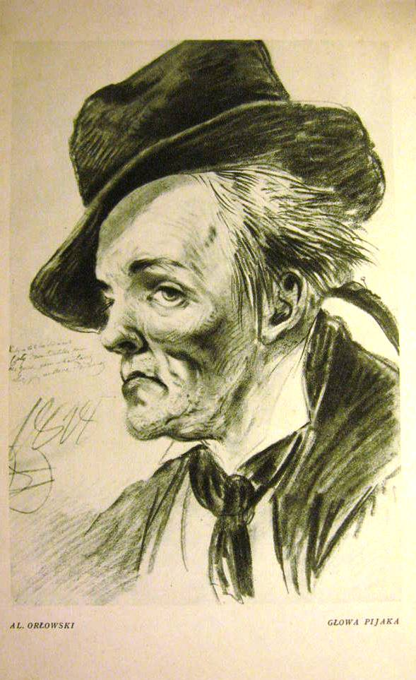 Орловский, Александр Осипович. Голова пьяницы